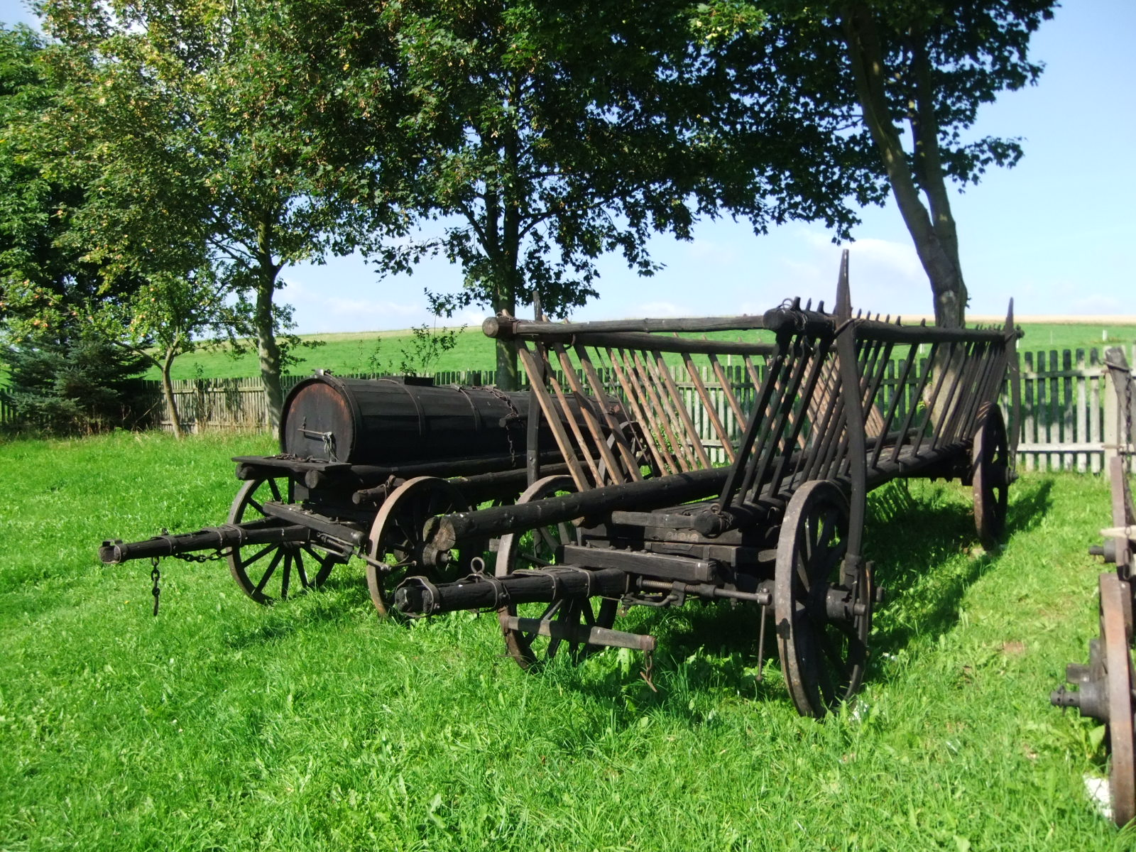 Erntewagen im Dorfmuseum Gahlenz